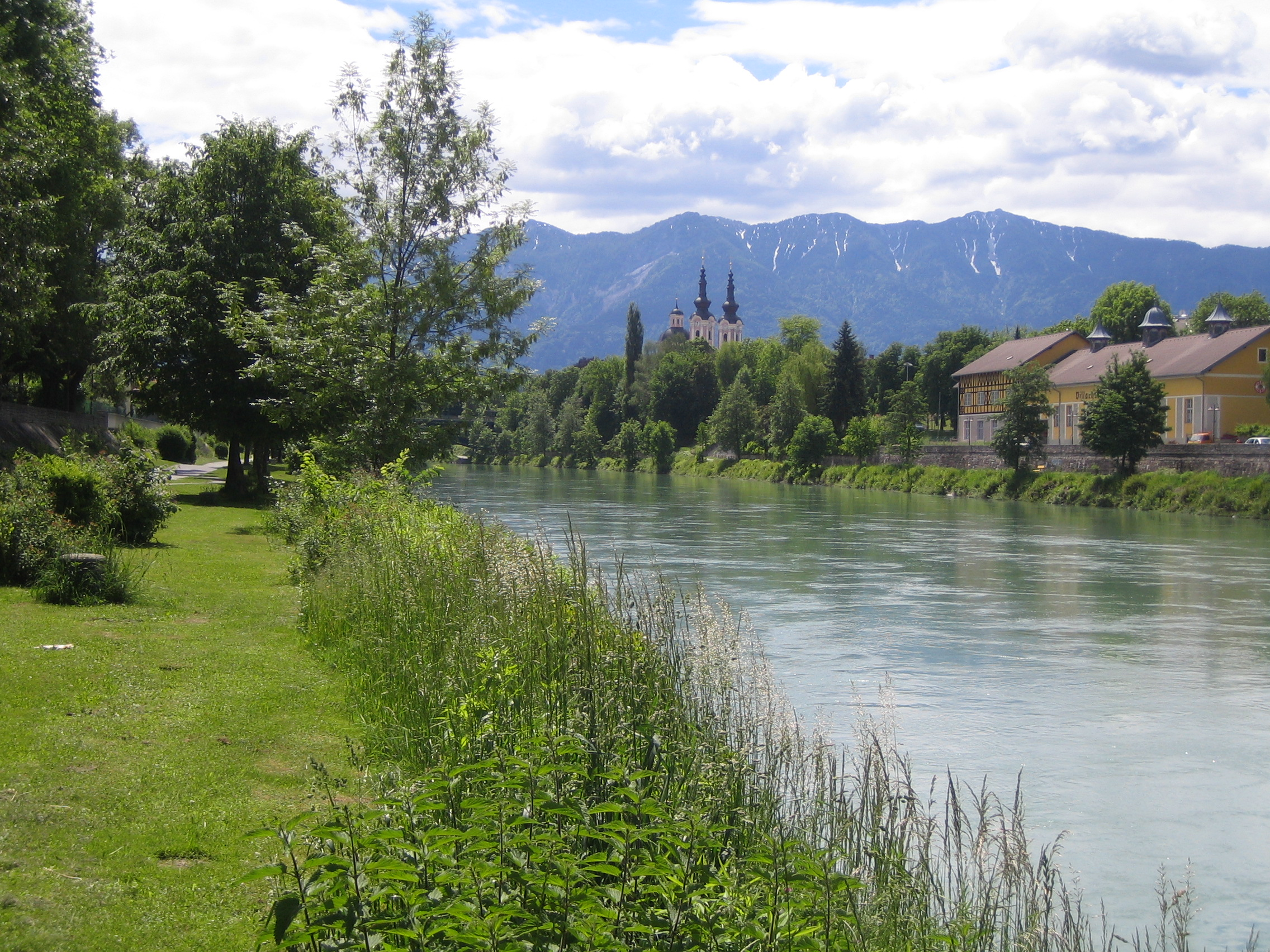 Die Drau in Villach, Österreich River Drava at Villach, Austria